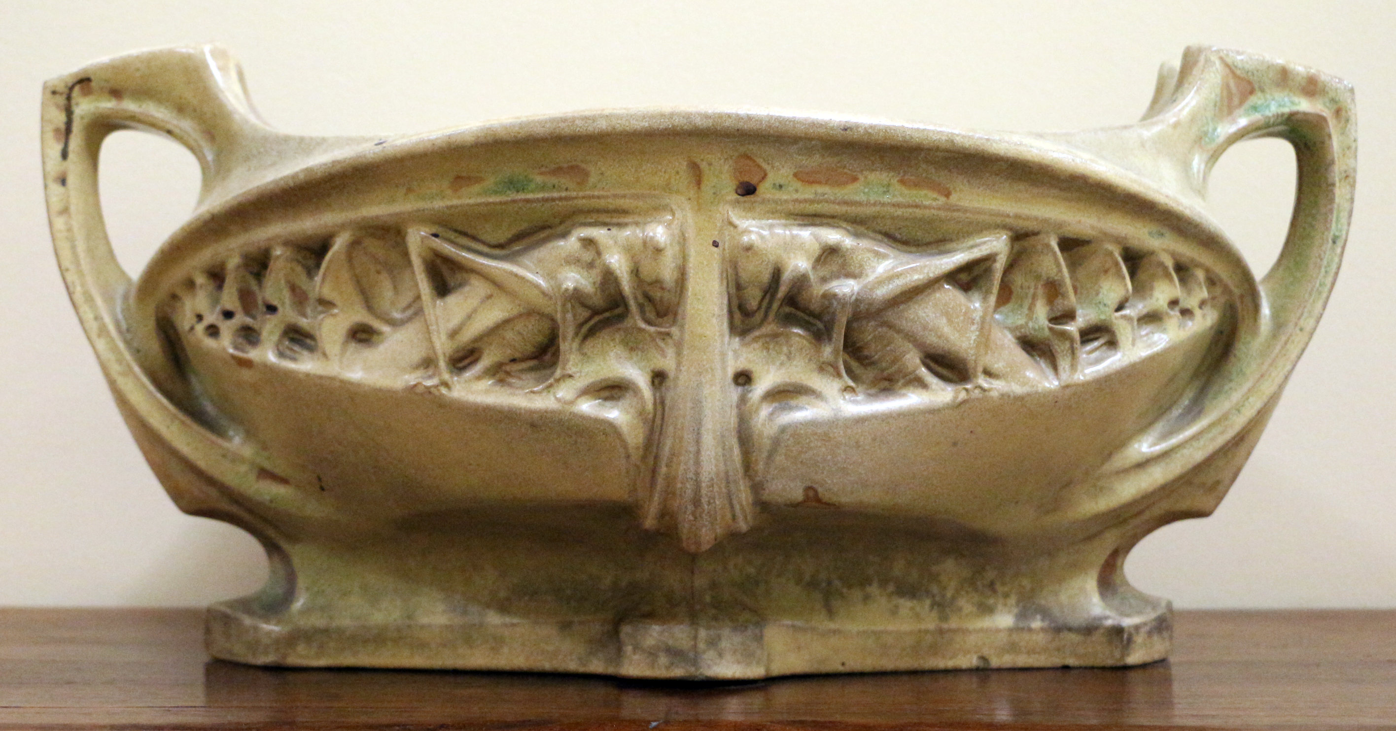 Jules cayette, vaso da fiori 'les asauterelles', nancy 1907 ca..JPG